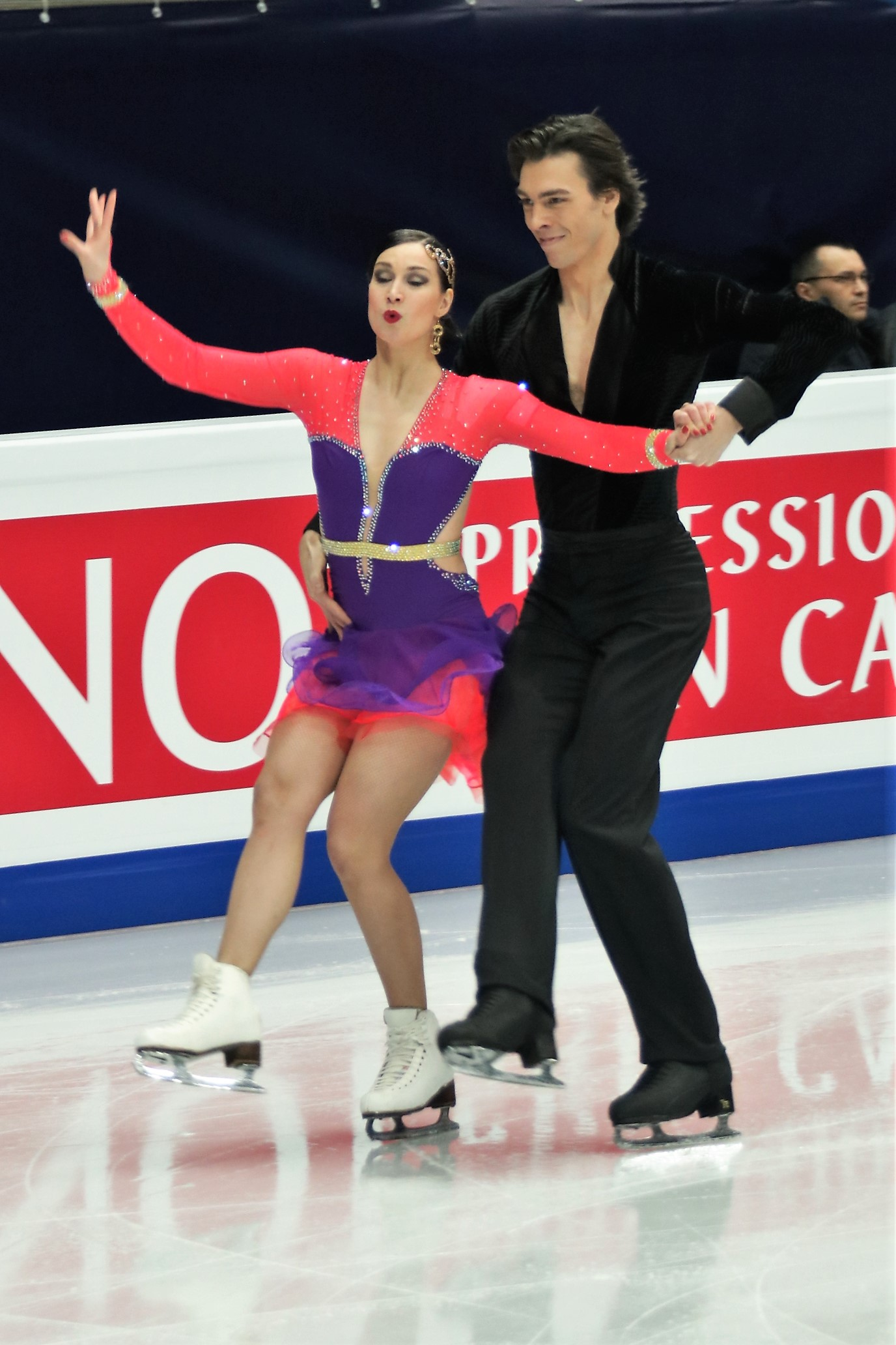 Люция Мысливечкова / Лукаш Цолли (Словакия) на Чемпионате Европы по фигурному катанию 2018.